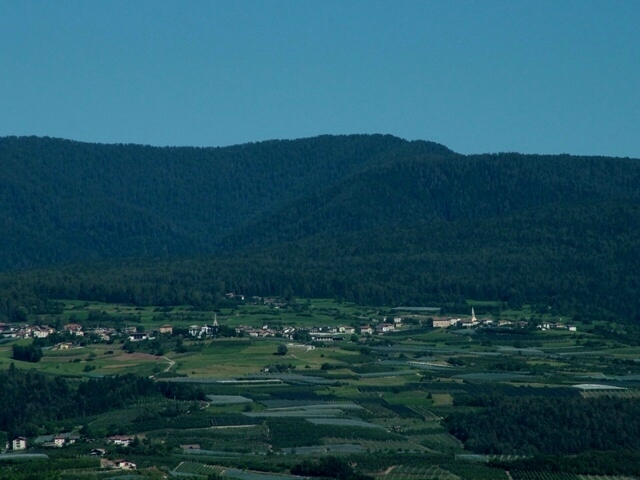 Panorama dei paesi di Sfruz e Smarano, fotografati da ovest